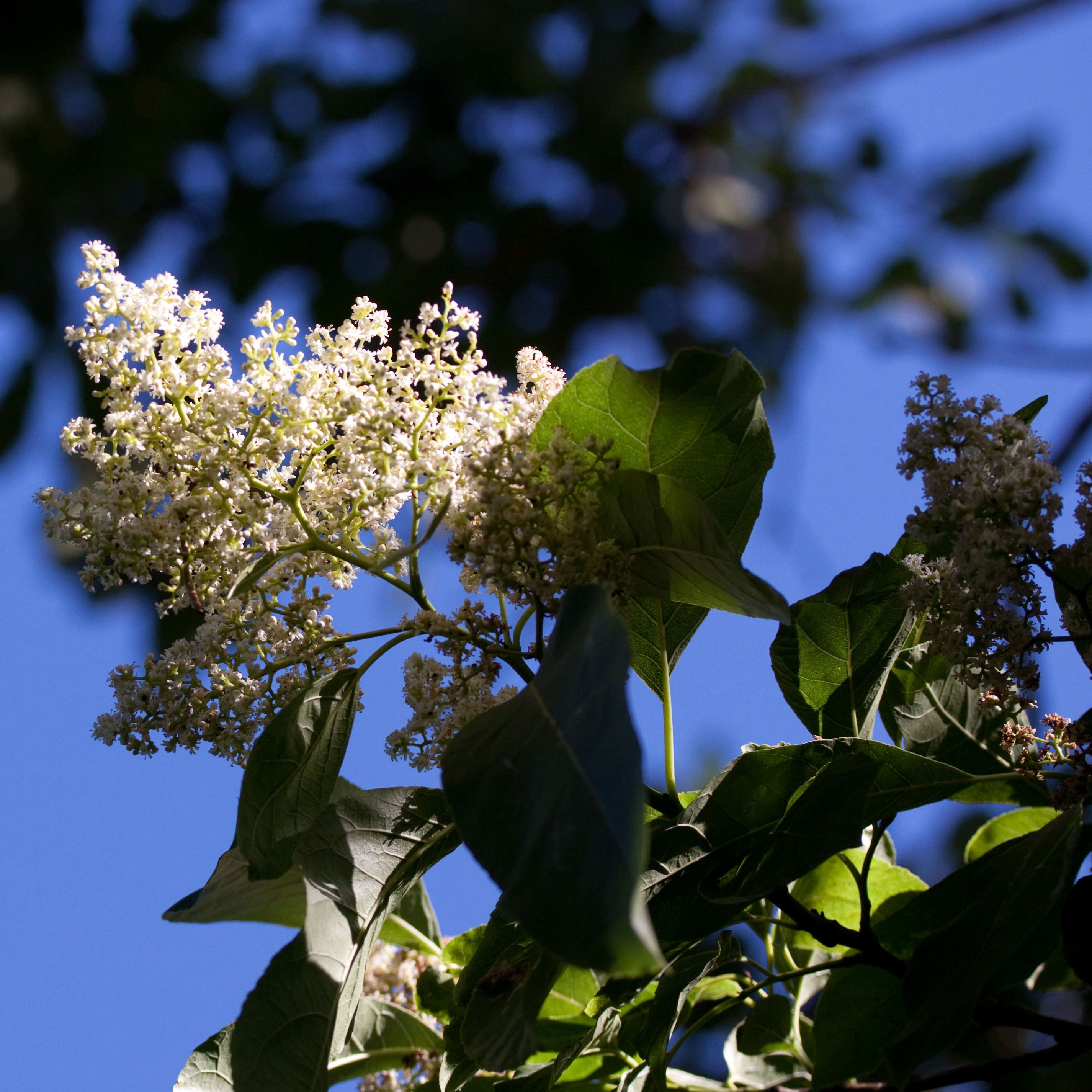 Fleur d'Ehretia acuminata - Jardin des Plantes - Paris - France